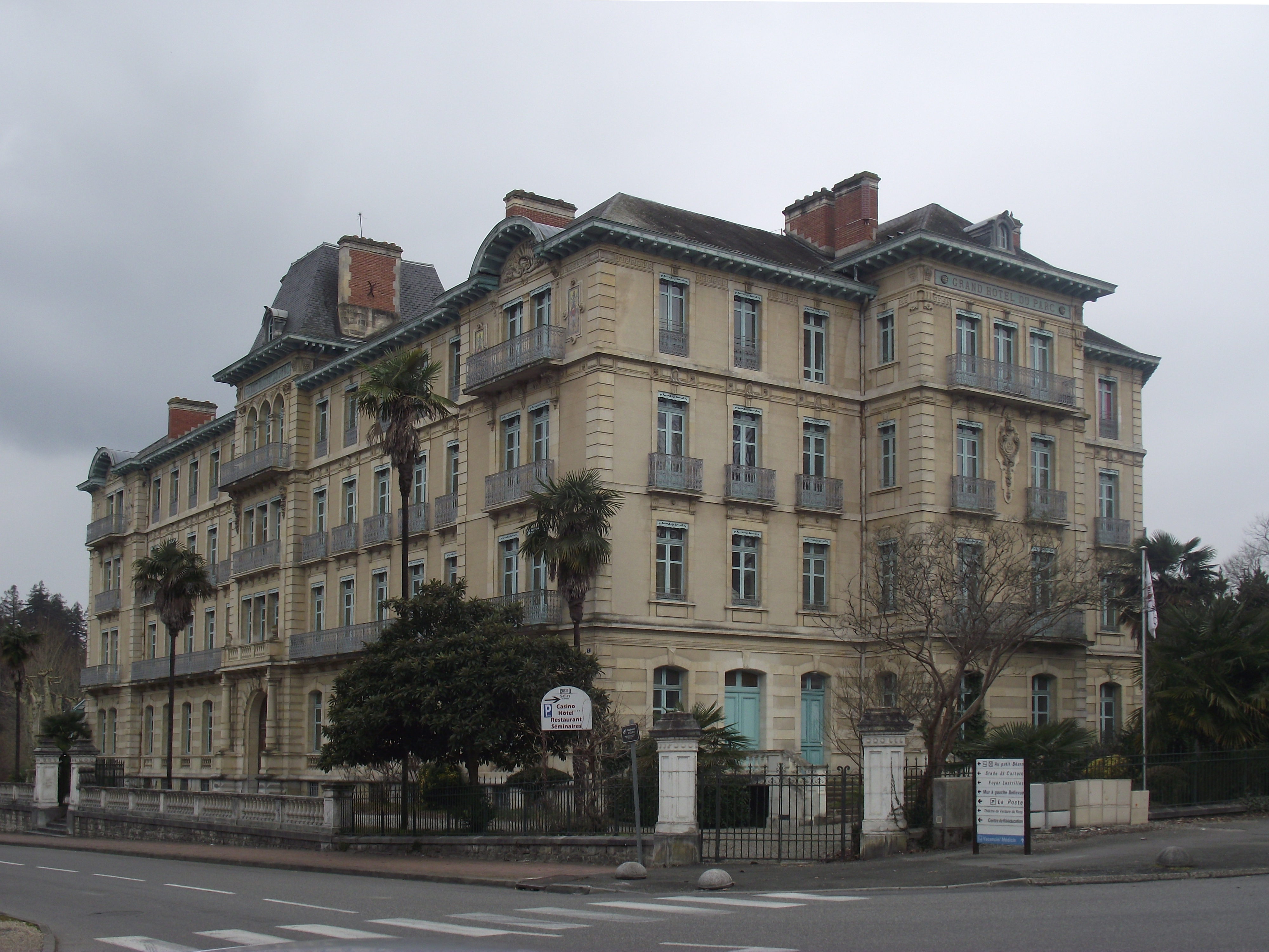 Hotel-casino du Parc (Salies-de-Béarn, Pyrénées-Atlantiques, France)